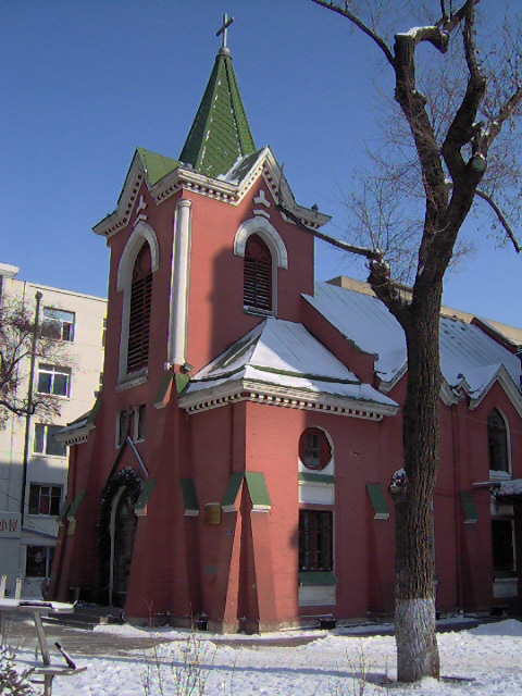 哈尔滨东大直街基督教堂